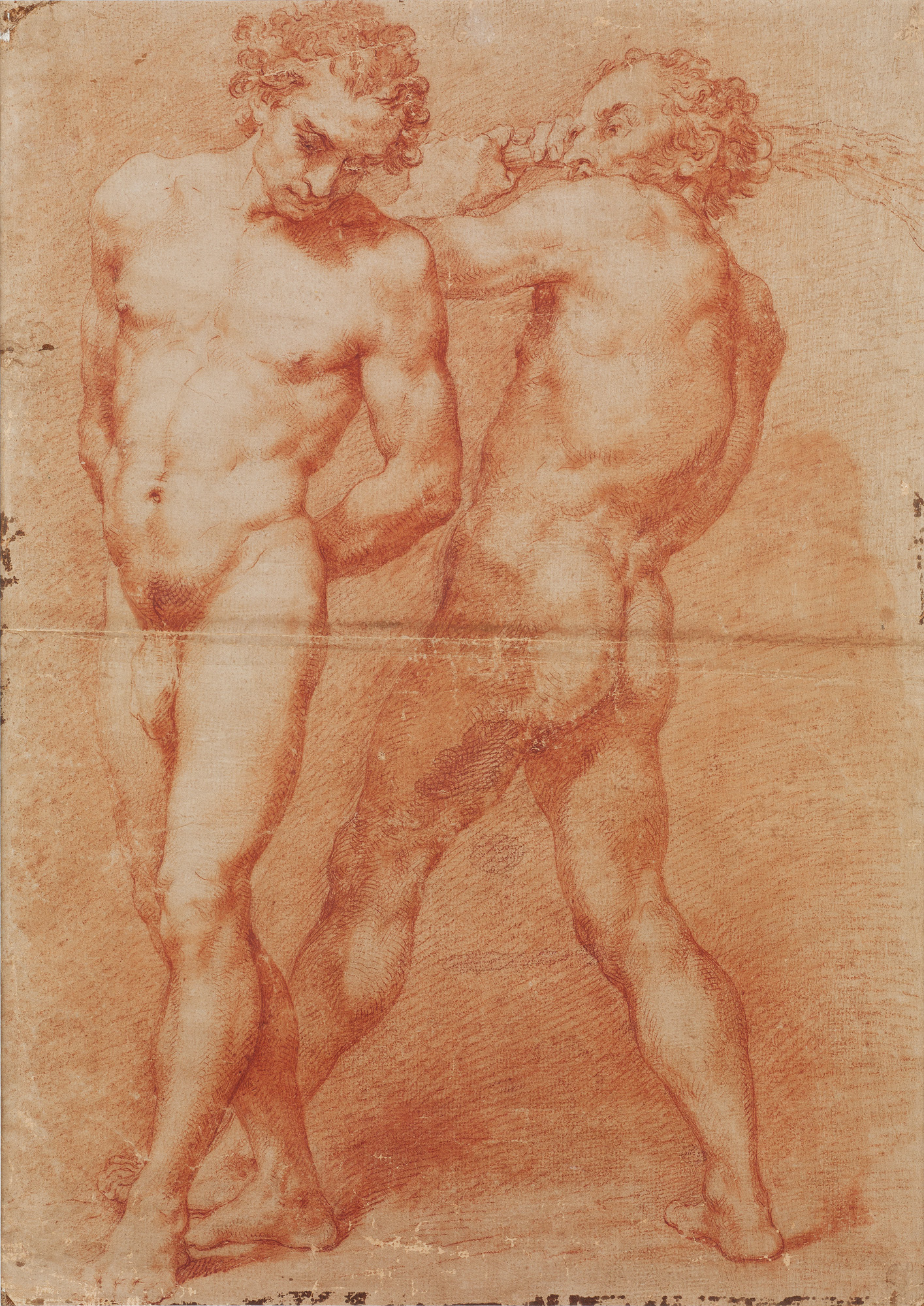 Dibujo La Flagelación de Vicente López